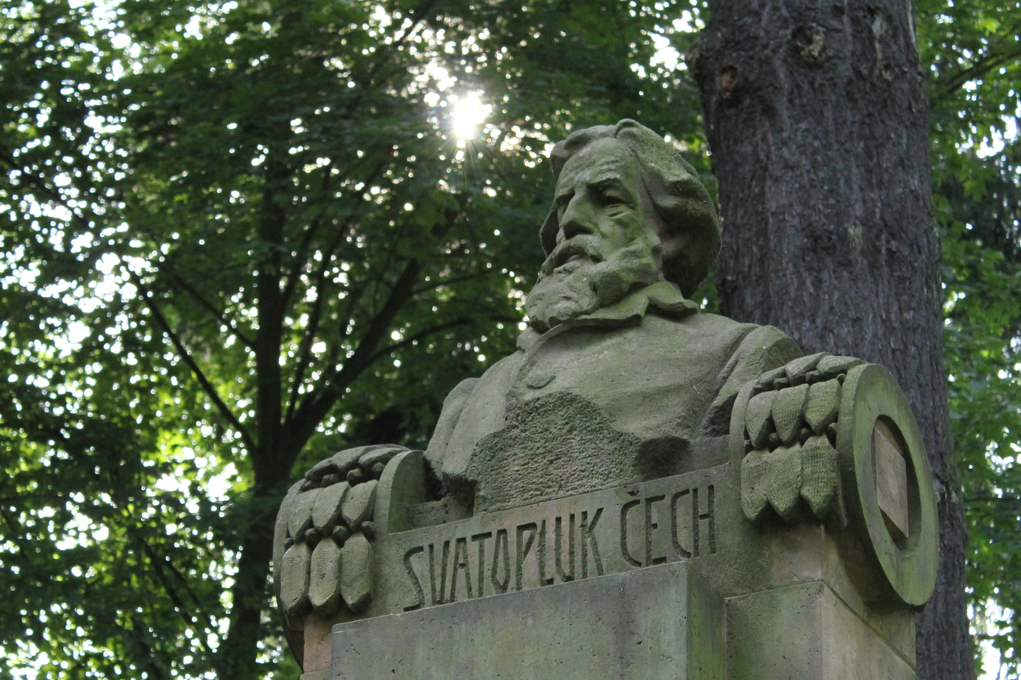 Busta Svatopluka Čecha, park v Rovensku pod Troskami